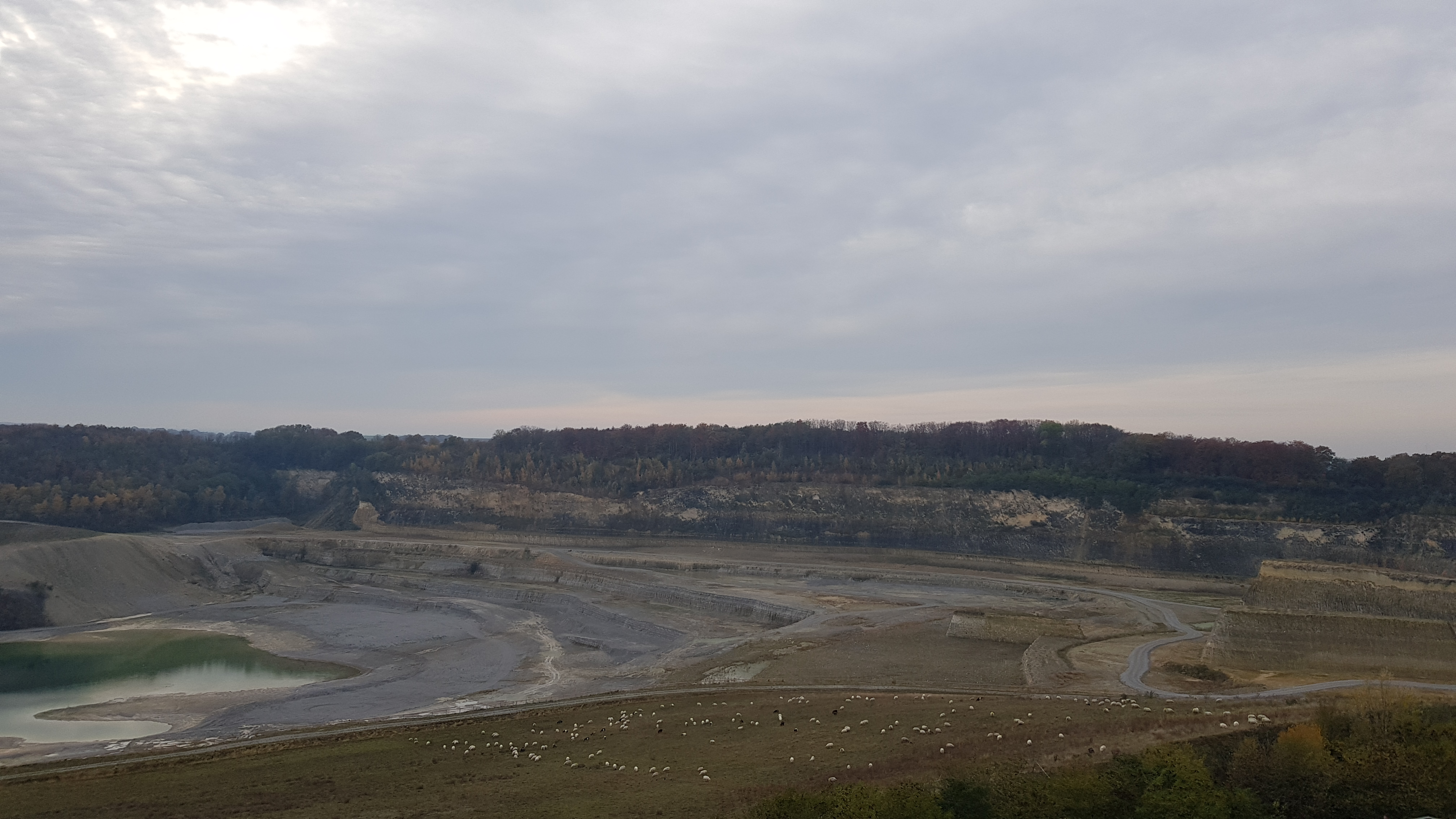 ENCI-bos gezien vanaf uitzichtsplatform, Maastricht, Nederland